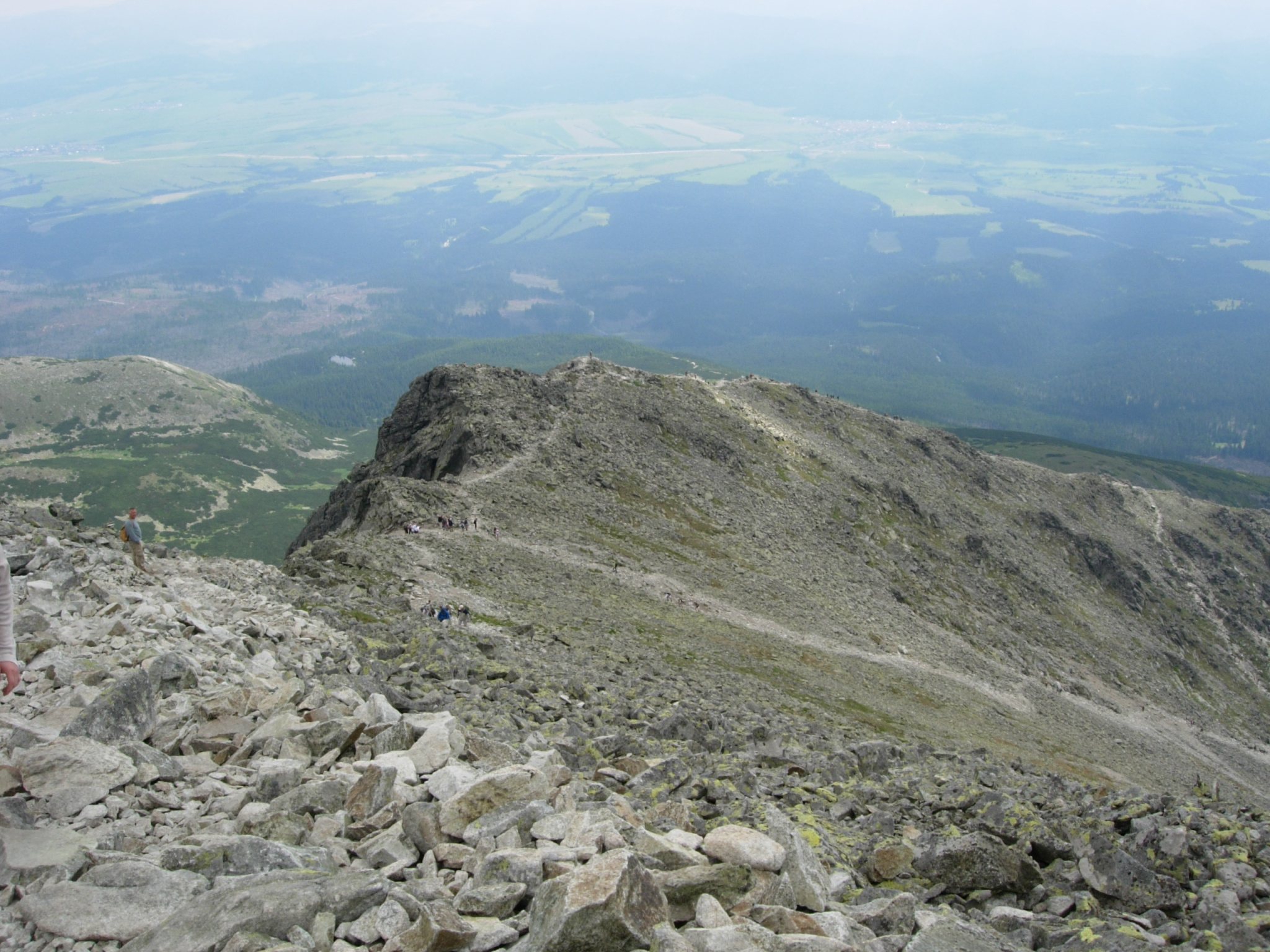 Maly Krivan